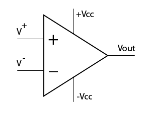 Simbol operacionog pojačavača. Ja sam autor ove slike i predajem je u javno vlasništvo. Licensing